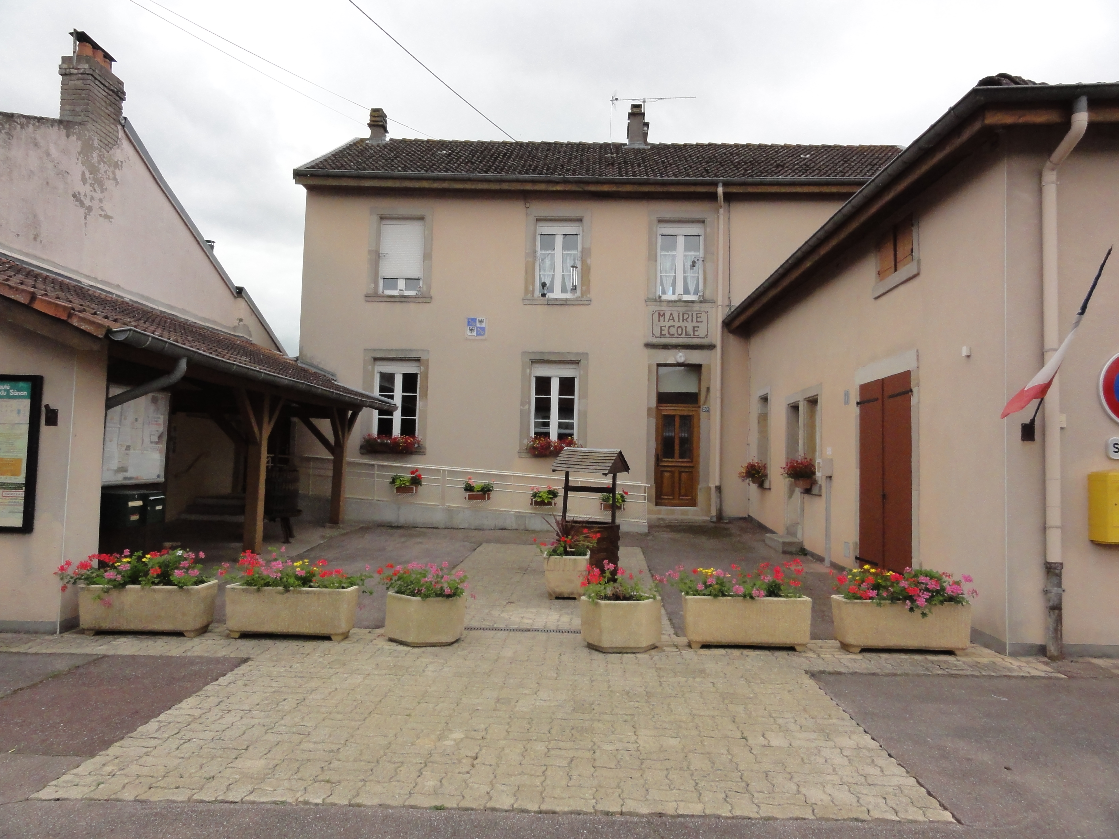 Xures (M-et-M) mairie-école